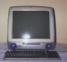 Sujet : iMac G3 de l'automne 2003 Date : 29 juillet 2005 Auteur : Archeos Description : ordinateur monobloc d'Apple Computer à tube cathodique, écran 15", fréquence 400 Mhz, automne 1999, vu de face, avec chargement des CD/DVD par mange disque. L'orifice du micro est visible au-dessus de l'écran, les deux prises casques à gauche du mange-disque. Licence : 3 août 2005 à 06:57 Archeos 262x245 (117 653 octets) ( * Sujet : :fr:iMac G3 de l'automne 2003 * Date : 29 juillet 2005 * Auteur : :fr:Archeos * Description : ordinateur monobloc d' :fr:Apple Computer à tube cathodique, écran 15", fréquence 400 Mhz, automne 1999,)